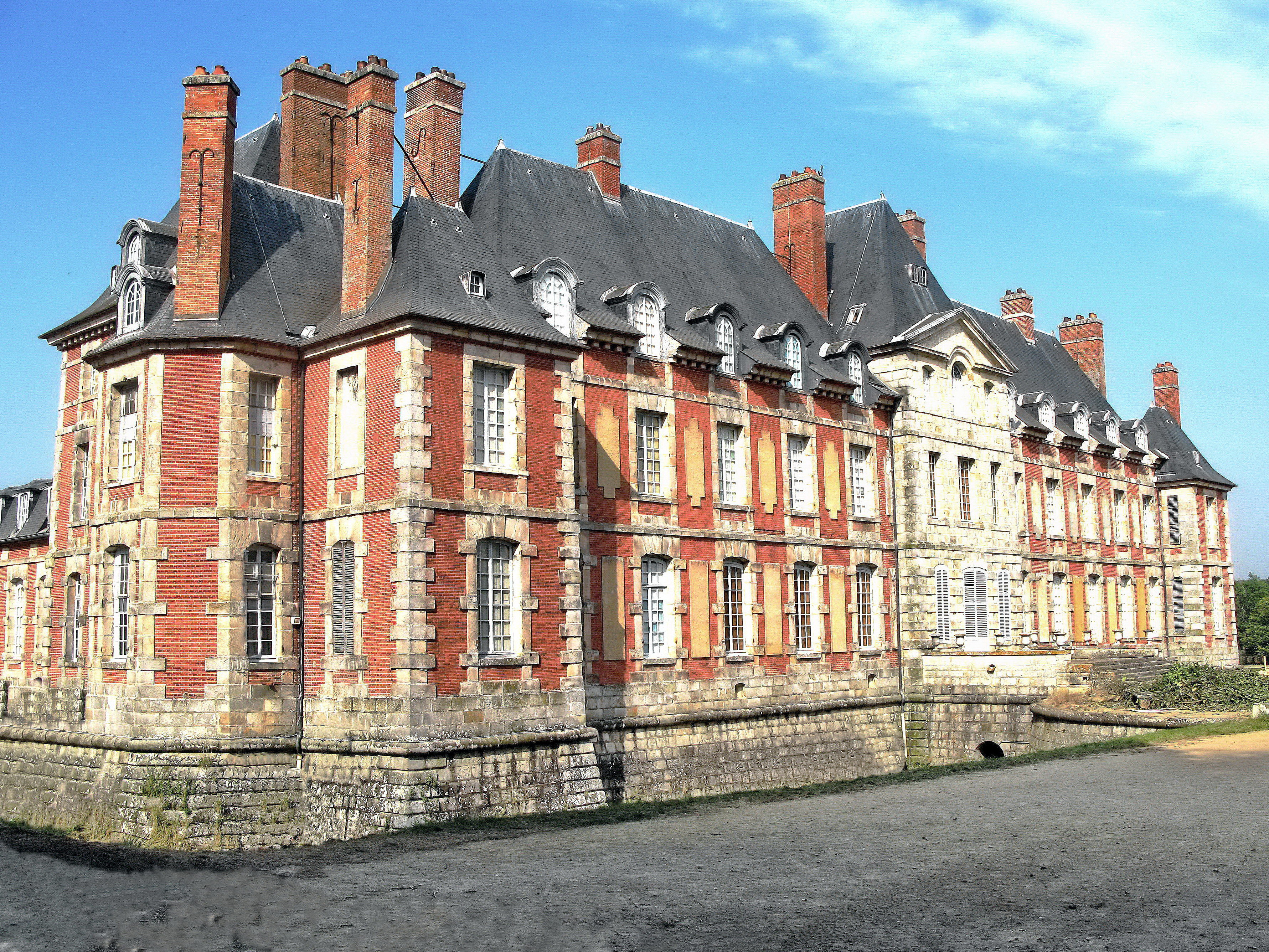 Façade sud du château de Bâville